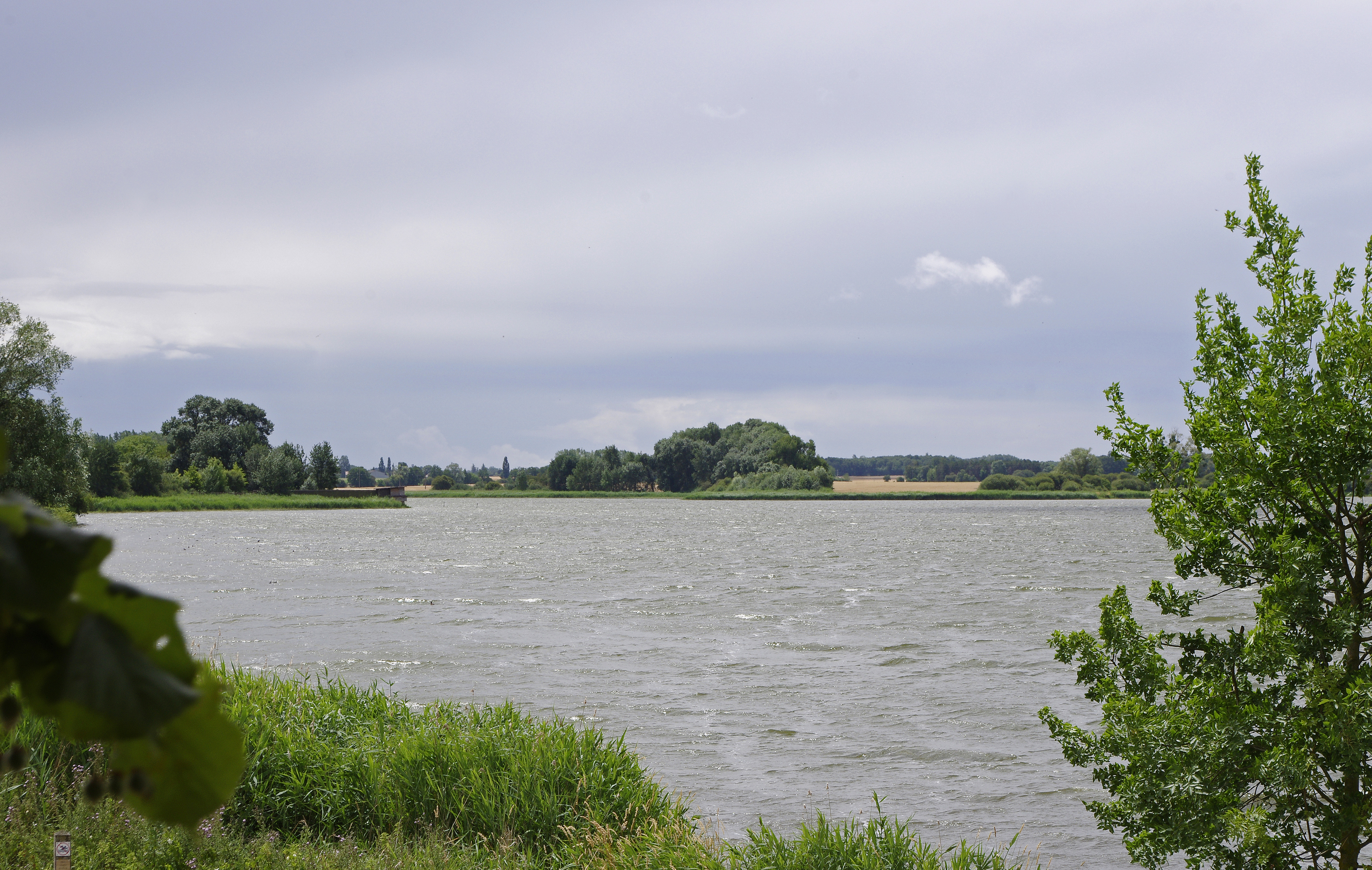 Le Louroux (Indre-et-Loire) L'étang du Louroux. L'étang du village, creusé par les moines de l'ancien prieuré, est un des plus vastes d'Indre-et-Loire. Sa vocation était piscicole.